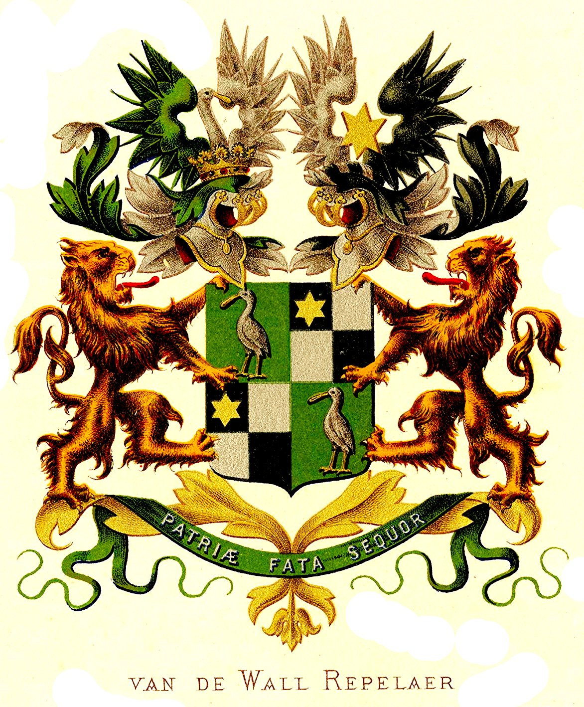 Wappen derer van de Wall Repelaer, des Stammes Repelaer (geadelt 1816).